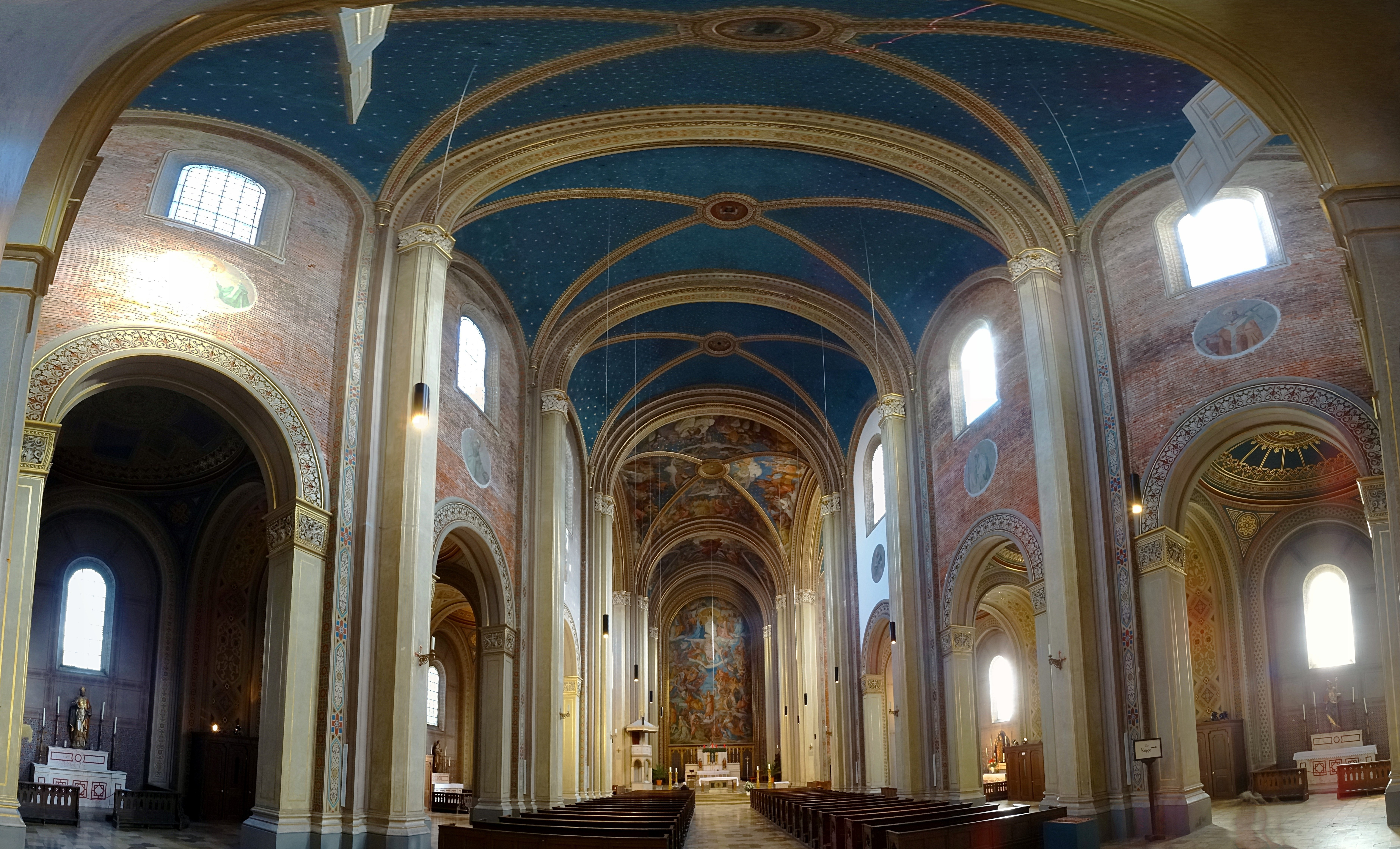 Innenraumpanorama der Ludwigskirche München